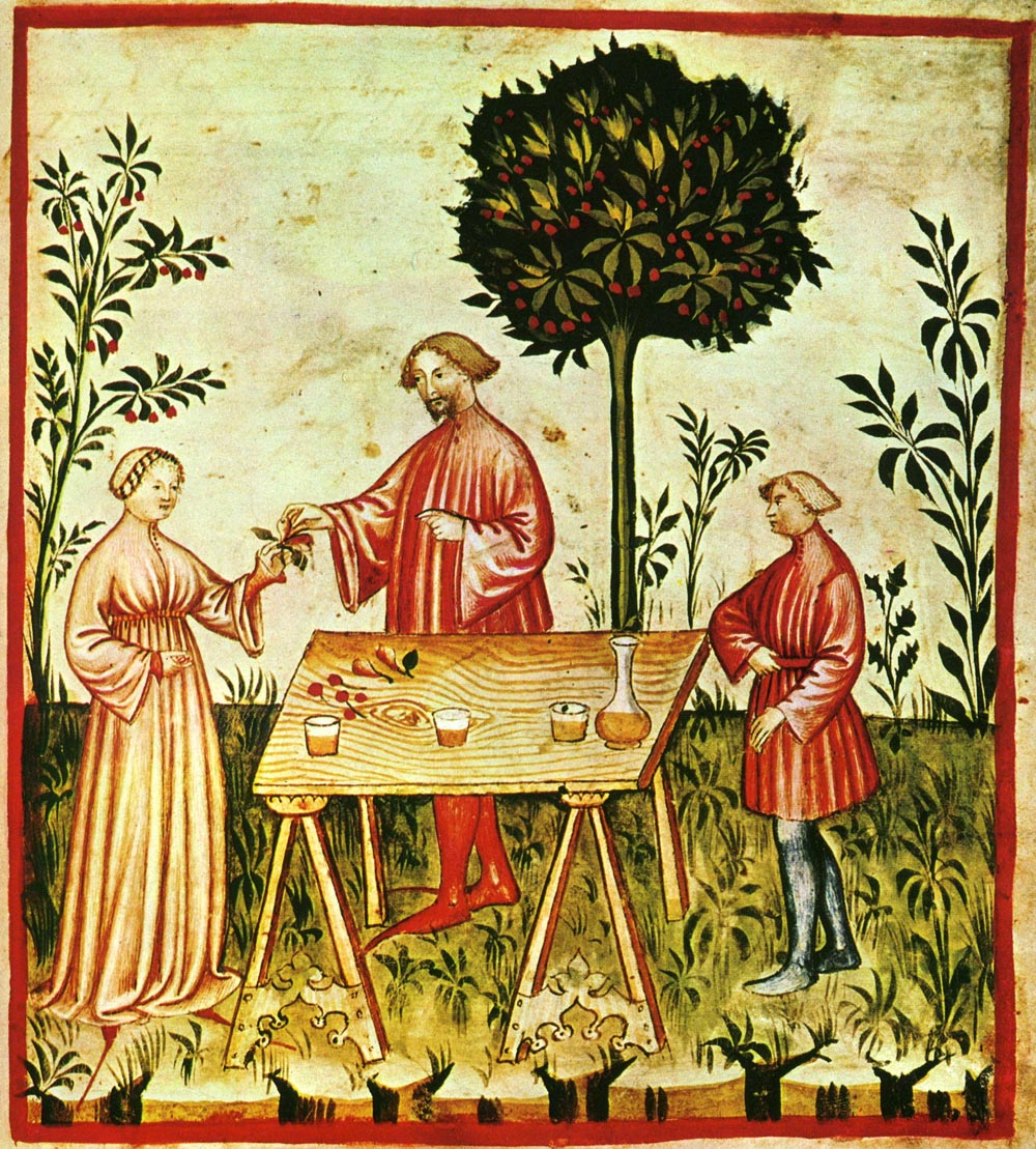 Alimenti: vino bianco, dal Taccuino Sanitatis, Manoscritto Casanatense 4182 (XIV secolo).